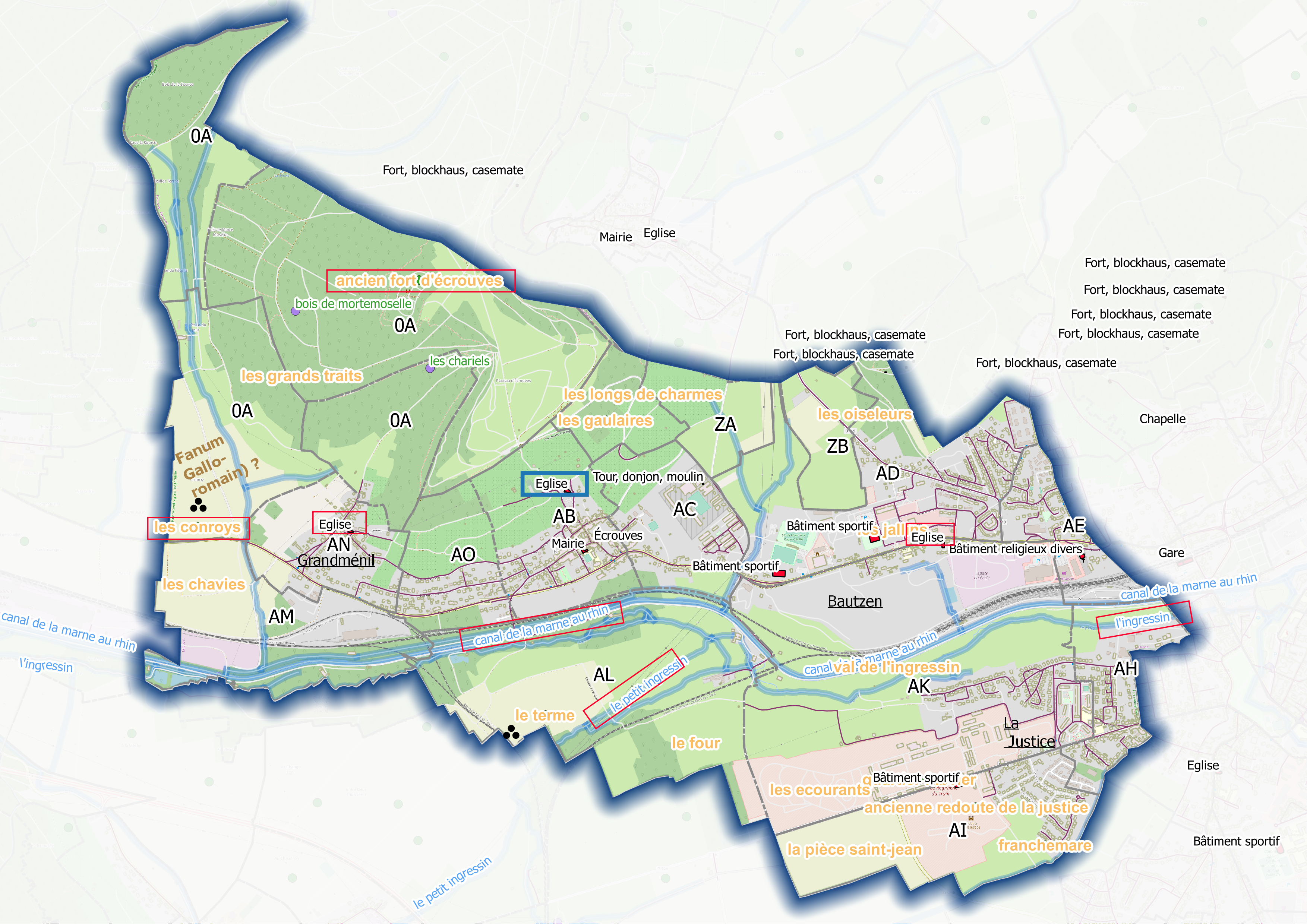 Ban communal (Qgis et OSM)